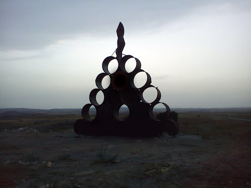 El Monumento al Espigolero es una escultura de Juan José Barragán situada en Escorihuela (Aragón)